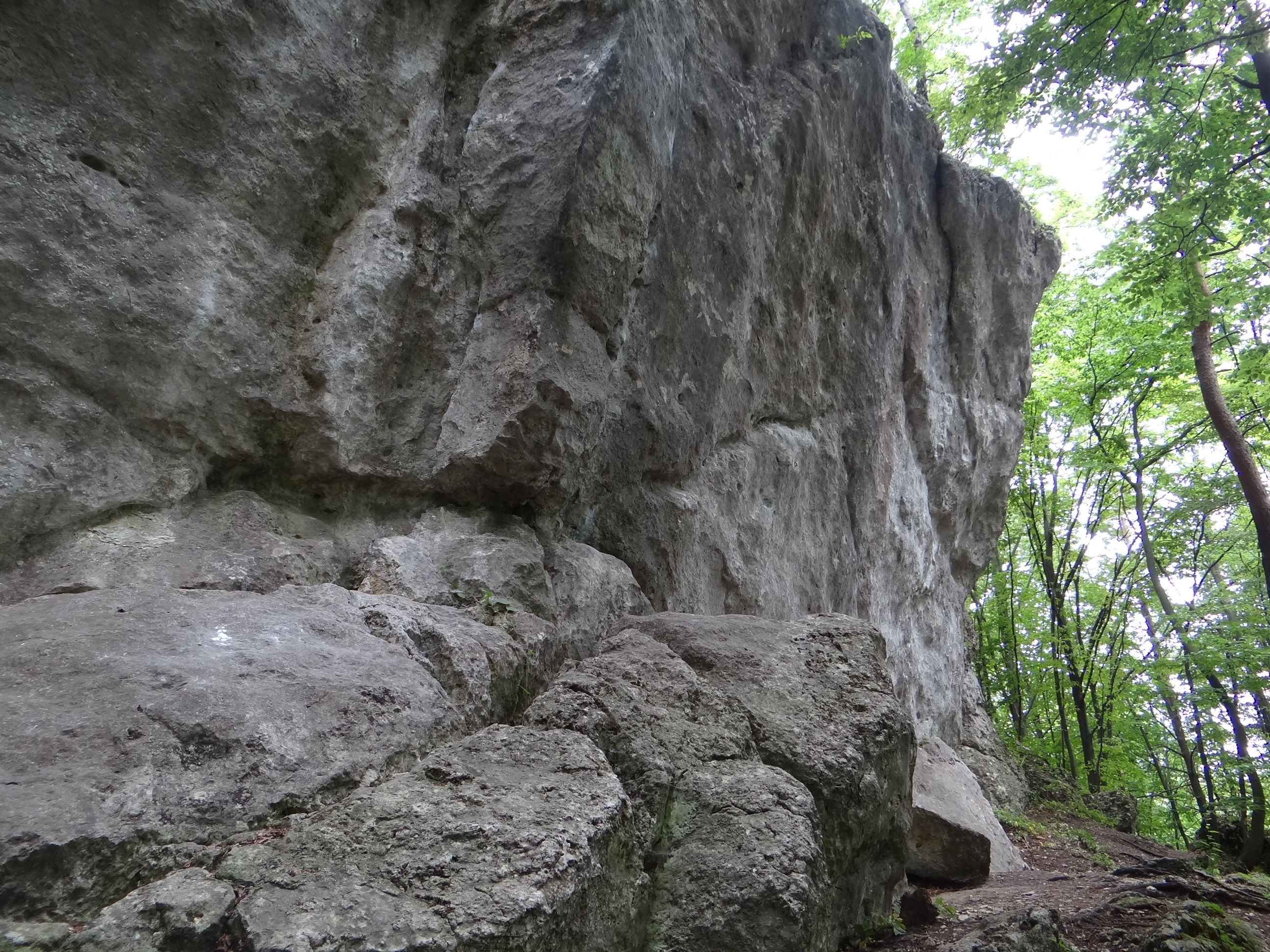 Skała Heavy Metal na wzgórzu Łężec między Morskiem i Podlesicami